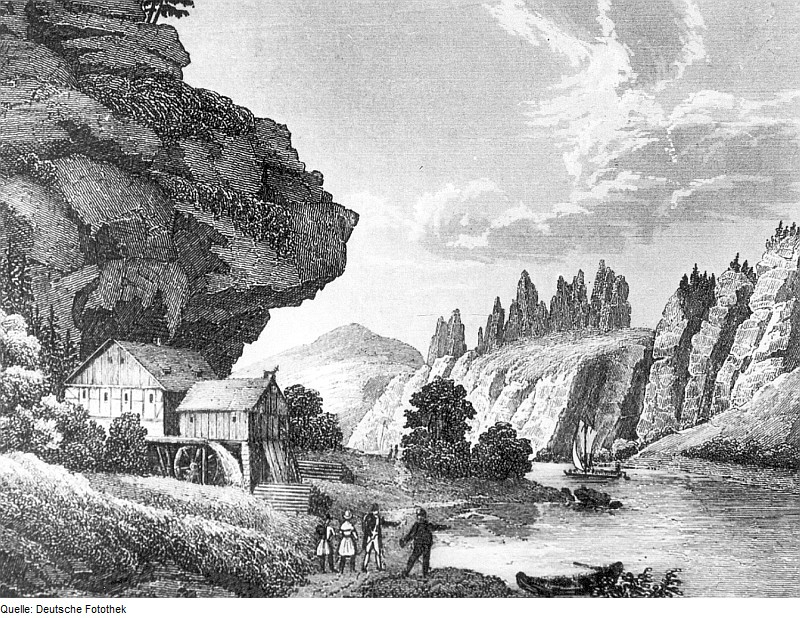 Original image description from the Deutsche Fotothek Reinhardtsdorf-Schöna-Schöna. Hirschmühle, aus: Schiffner, Albert: Beschreibung von Sachsen, 1845